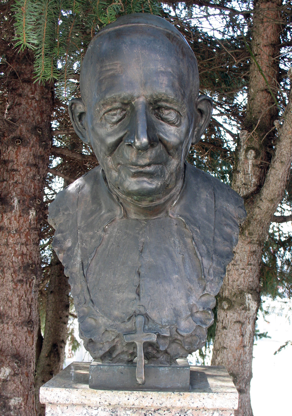 Autorom bronzovej busty biskupa Vojtašáka v Ružomberku je sochár Peter Valach